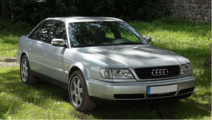 Audi S6 Plus Limousine mit nicht originalen Chrom Spiegelkappen